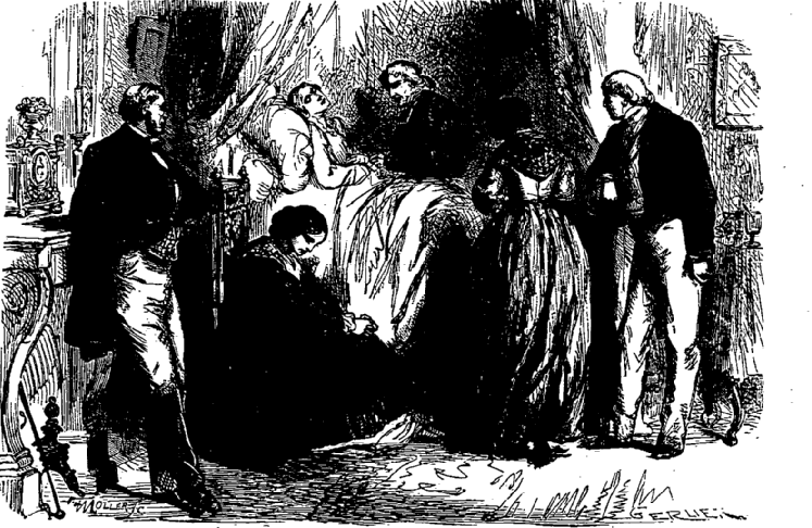 Illustration de Au Bonheur des Dames tirée des Œuvres complètes illustrées de Émile Zola, T1, Fasquelle, 1906, Mort de Genviève p.425